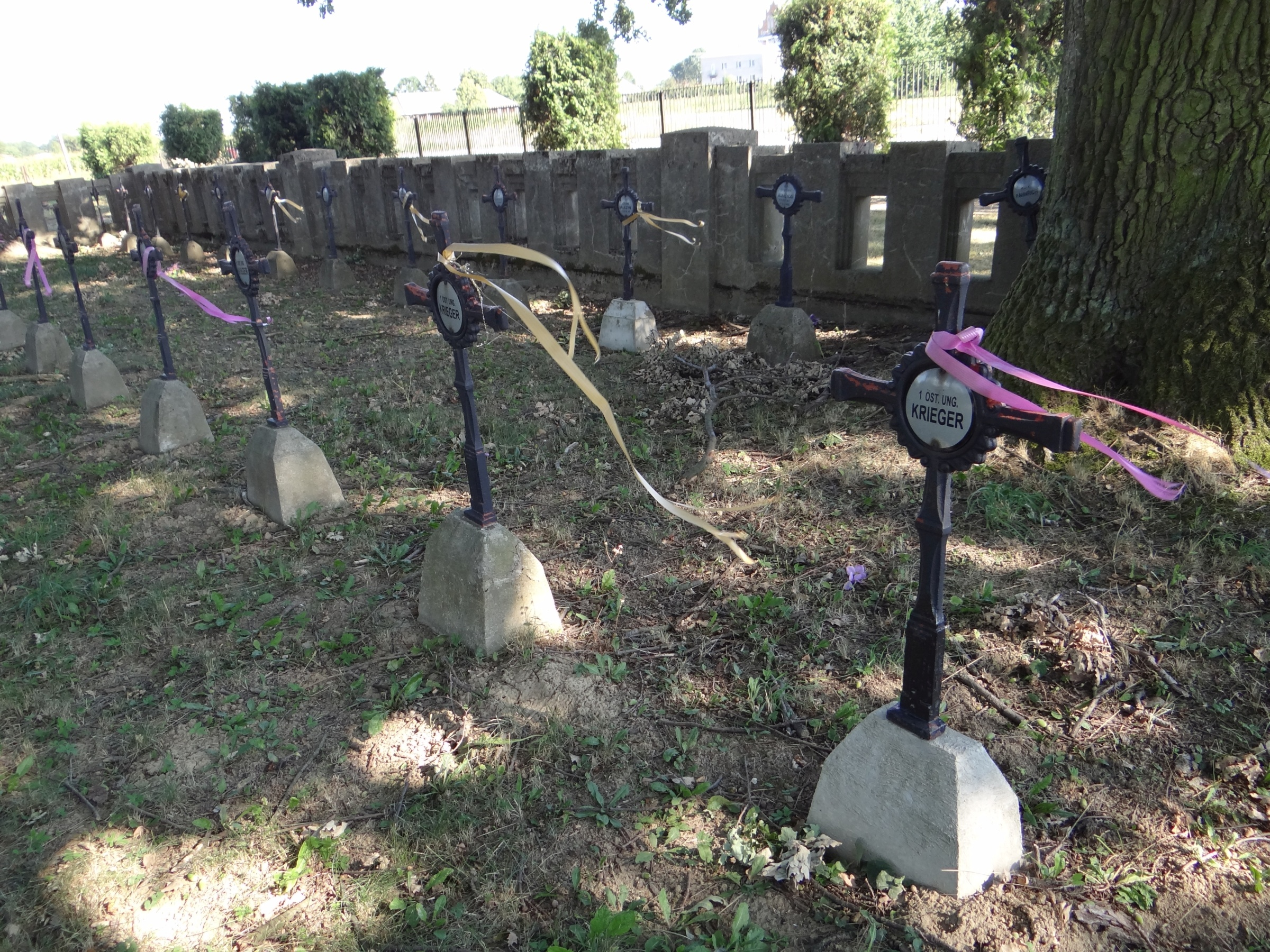 Cmentarz wojenny nr 255 - Wietrzychowice